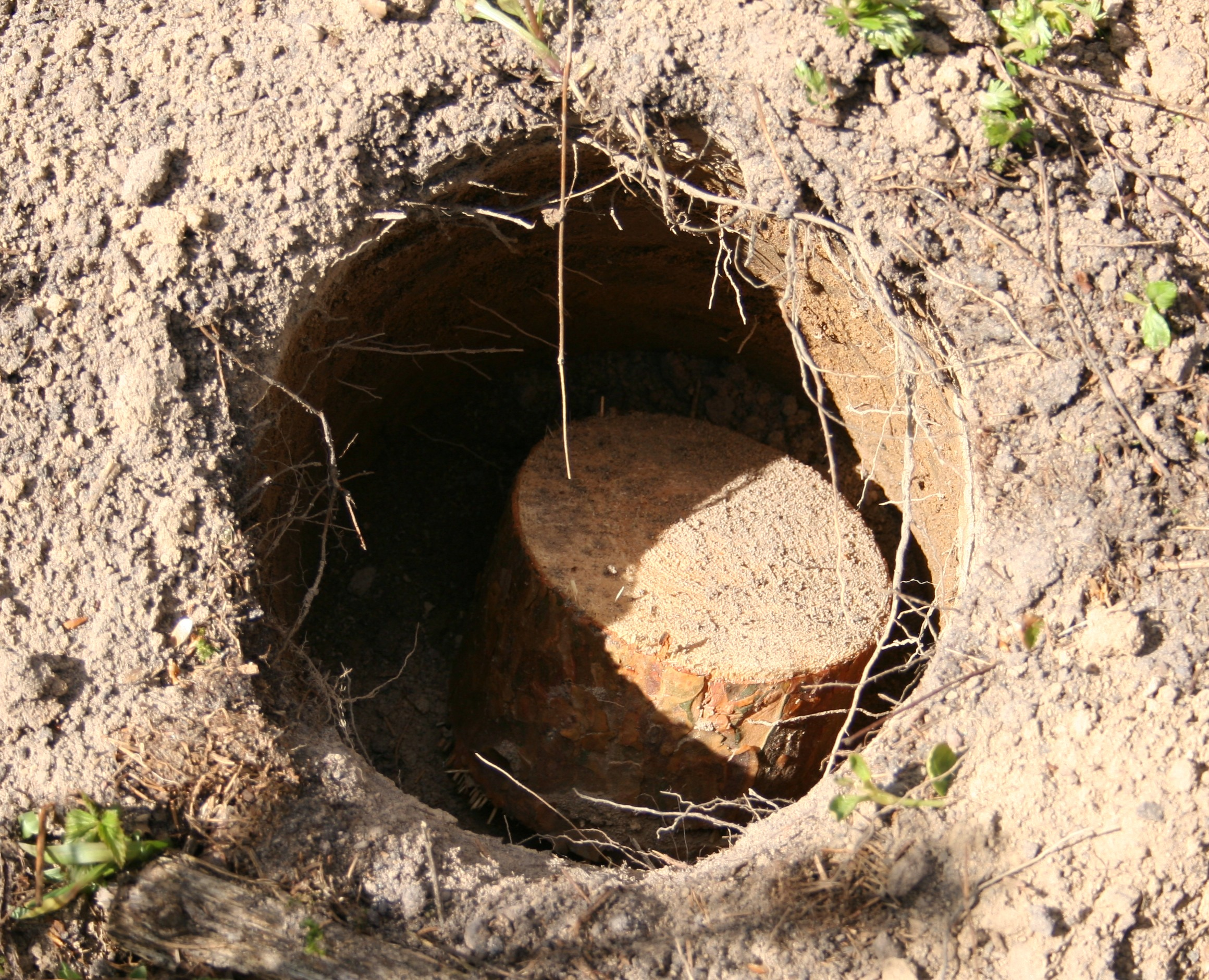 pułapka, Biłowieża